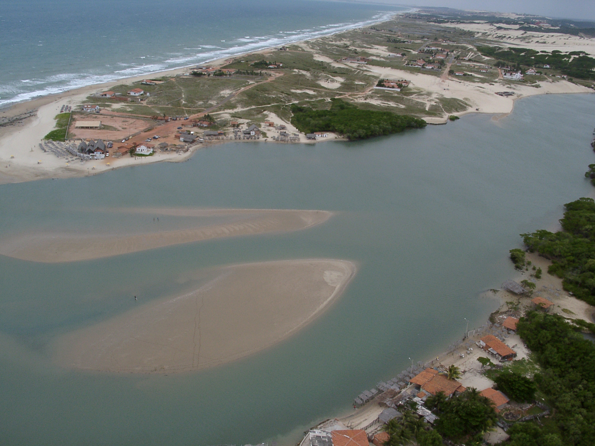 Rio Cocó Fortaleza, CE. Reserva Ecológica de Sapiranga